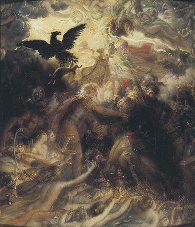 OSSIAN BEGROET DE ZIELEN VAN GESNEUVELDE STRIJDERS IN HET wALHALLA